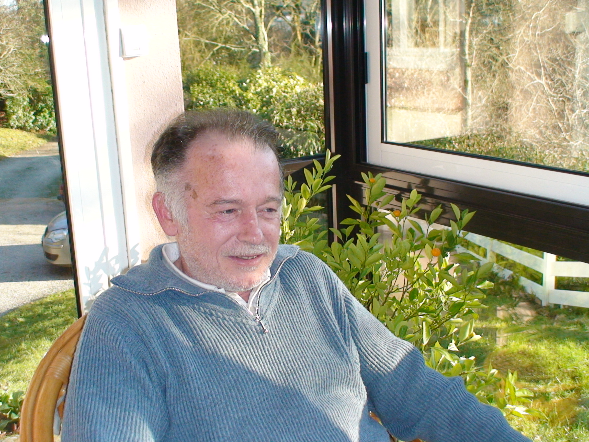 Skeudenn tapet d'al Lun 29 a viz Kerzu 2008.